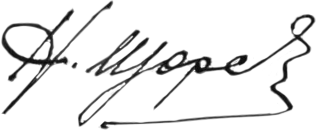 Роспись советского военного деятеля Николая Щорса (1895–1919)